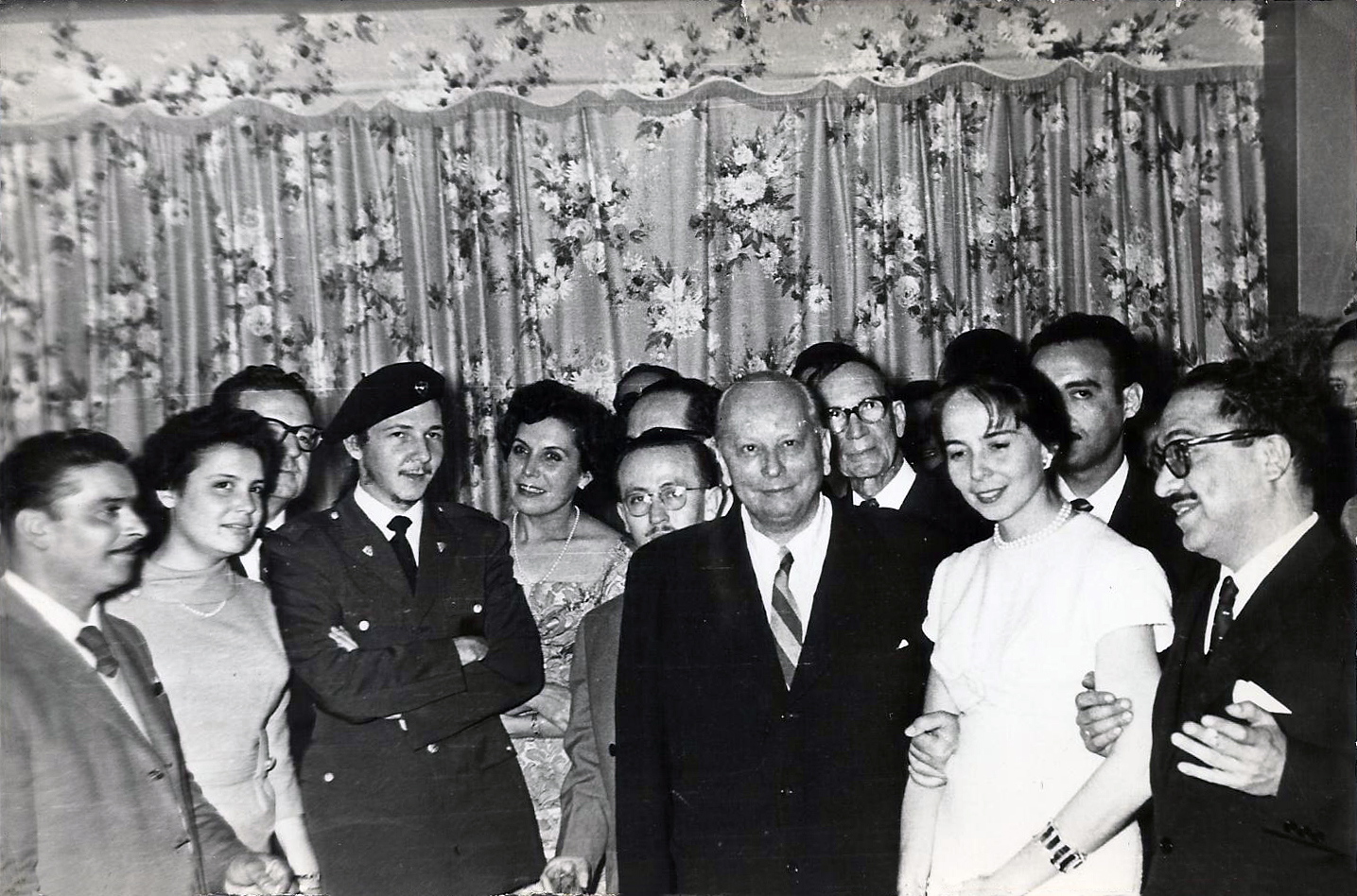 En Cuba, Agosto de 1959. El militar es el actual Presidente de Cuba Raúl Castro, también atrás de Cipriano Pontigo (primero de la izquierda) está el senador Salvador Allende y Hortensia Bussi. Agradecimientos: Cipriano Agustín Pontigo Urrutia / Carlos Pontigo Varela